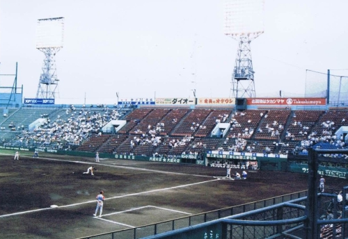 川崎球場（三塁側内野から撮影）